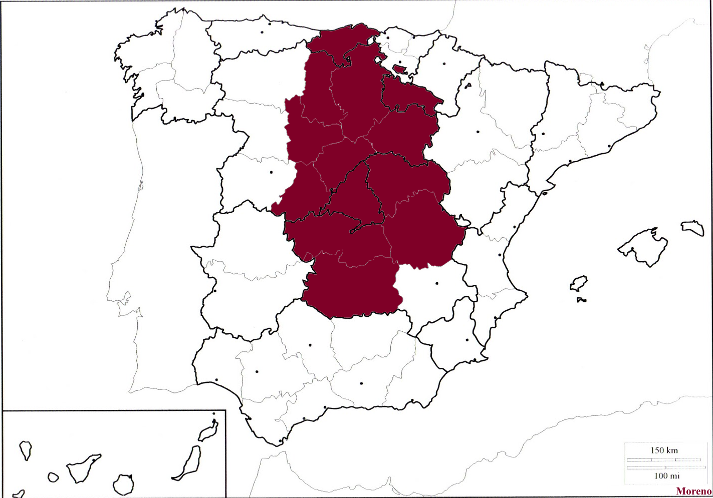 Mapa de las provincias castellanas